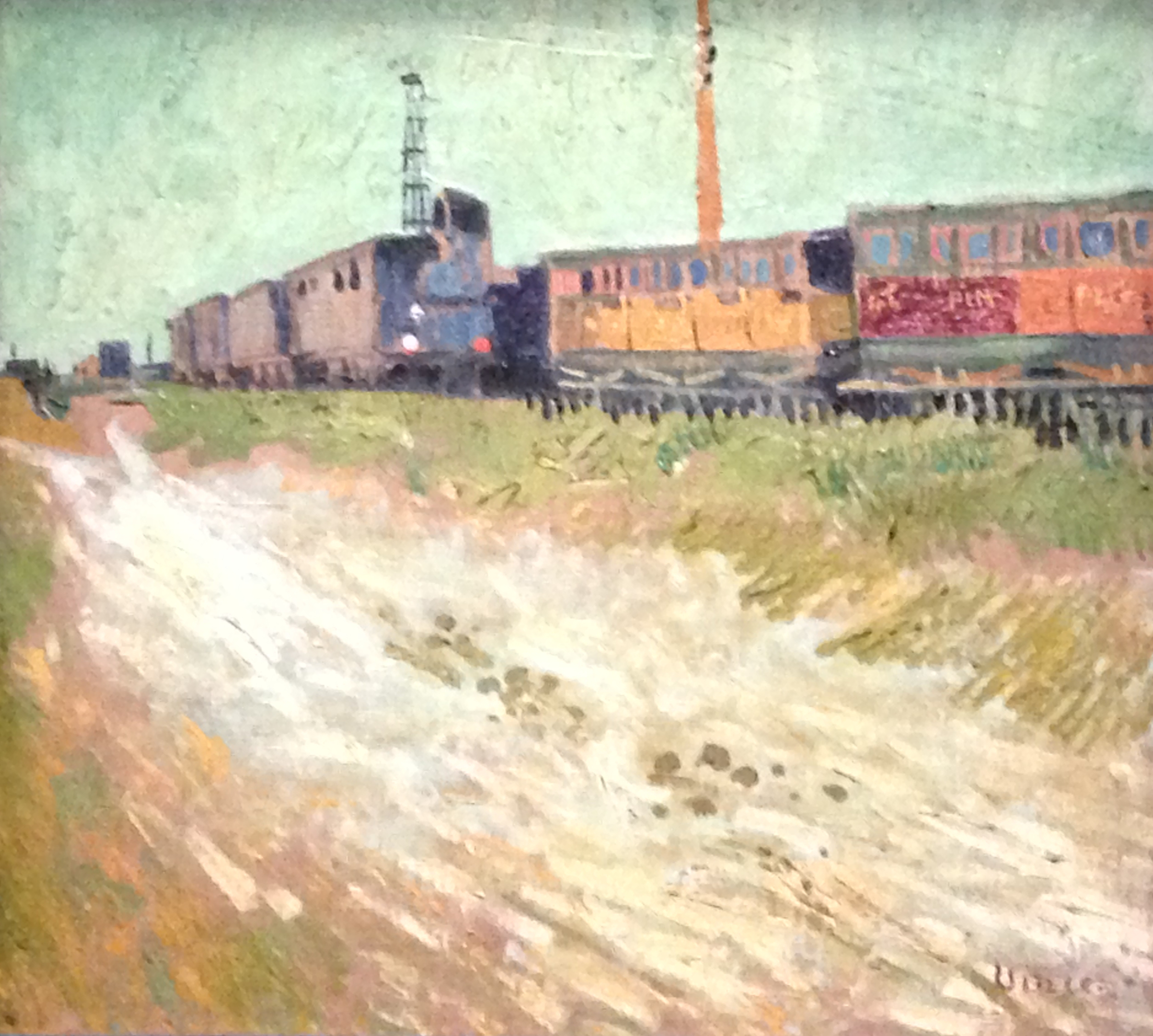 Tableau "Wagons de chemin de fer" d'août 1888 de Vincent Van Gogh, représentant la ligne Paris-Lyon-Marseille. Exposé de manière temporaire au Musée d'Orsay en 2014. Huile sur toile. Musée Angladon d'Avignon (Fondation Angladon-Dubrujeaud).